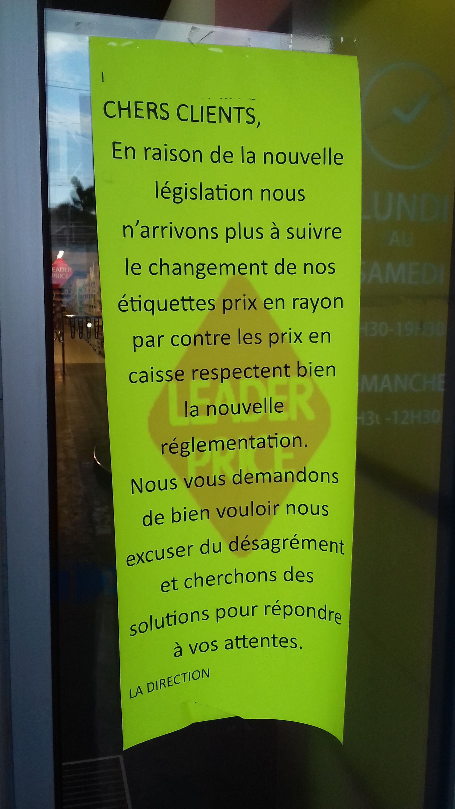 Message d'information affiché à l'entrée d'un supermarché suite à la mise en place de la TGC (Taxe Générale à la Consommation), instaurée le 1er octobre 2018 en Nouvelle-Calédonie.